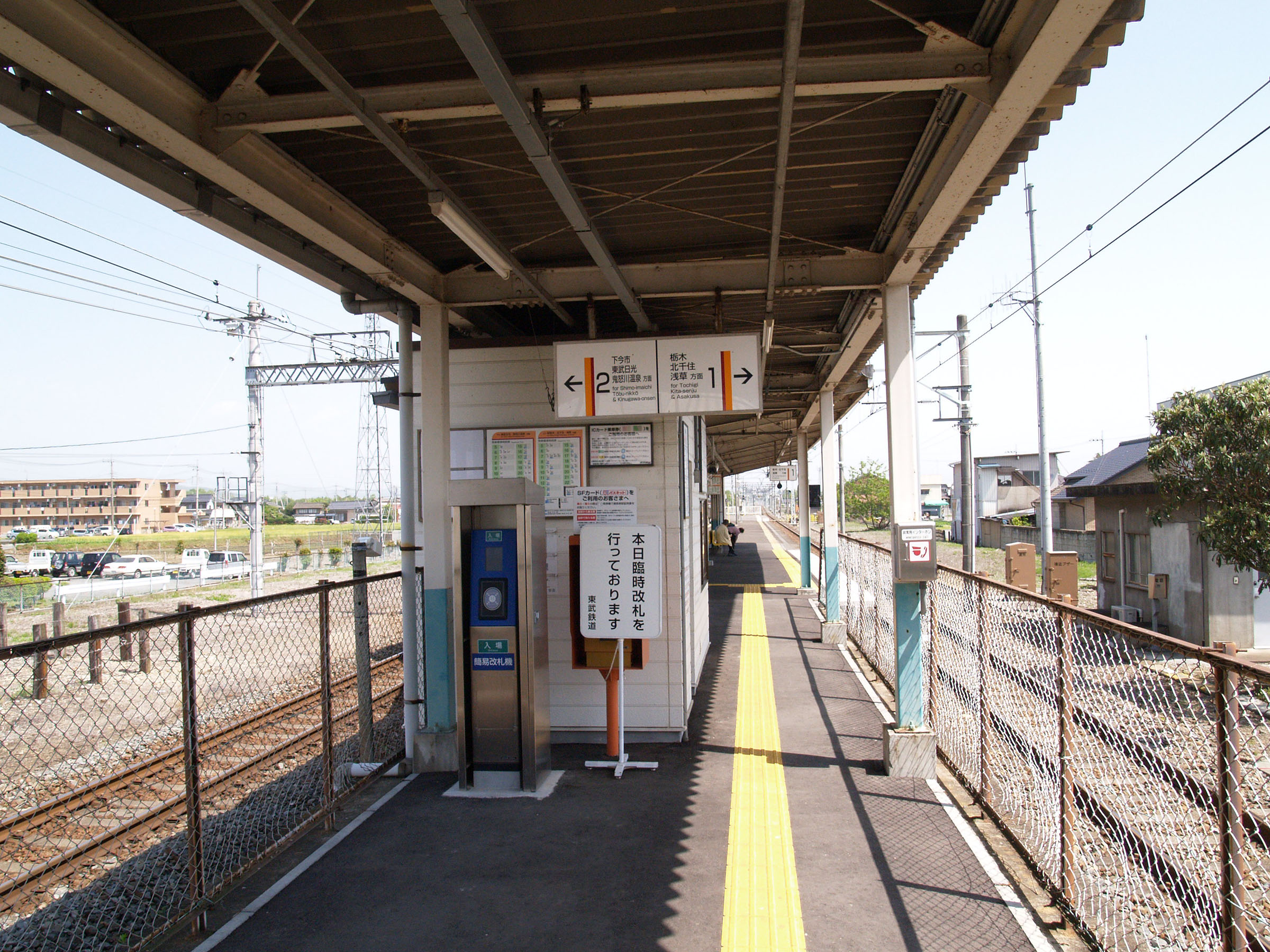 家中駅改札口